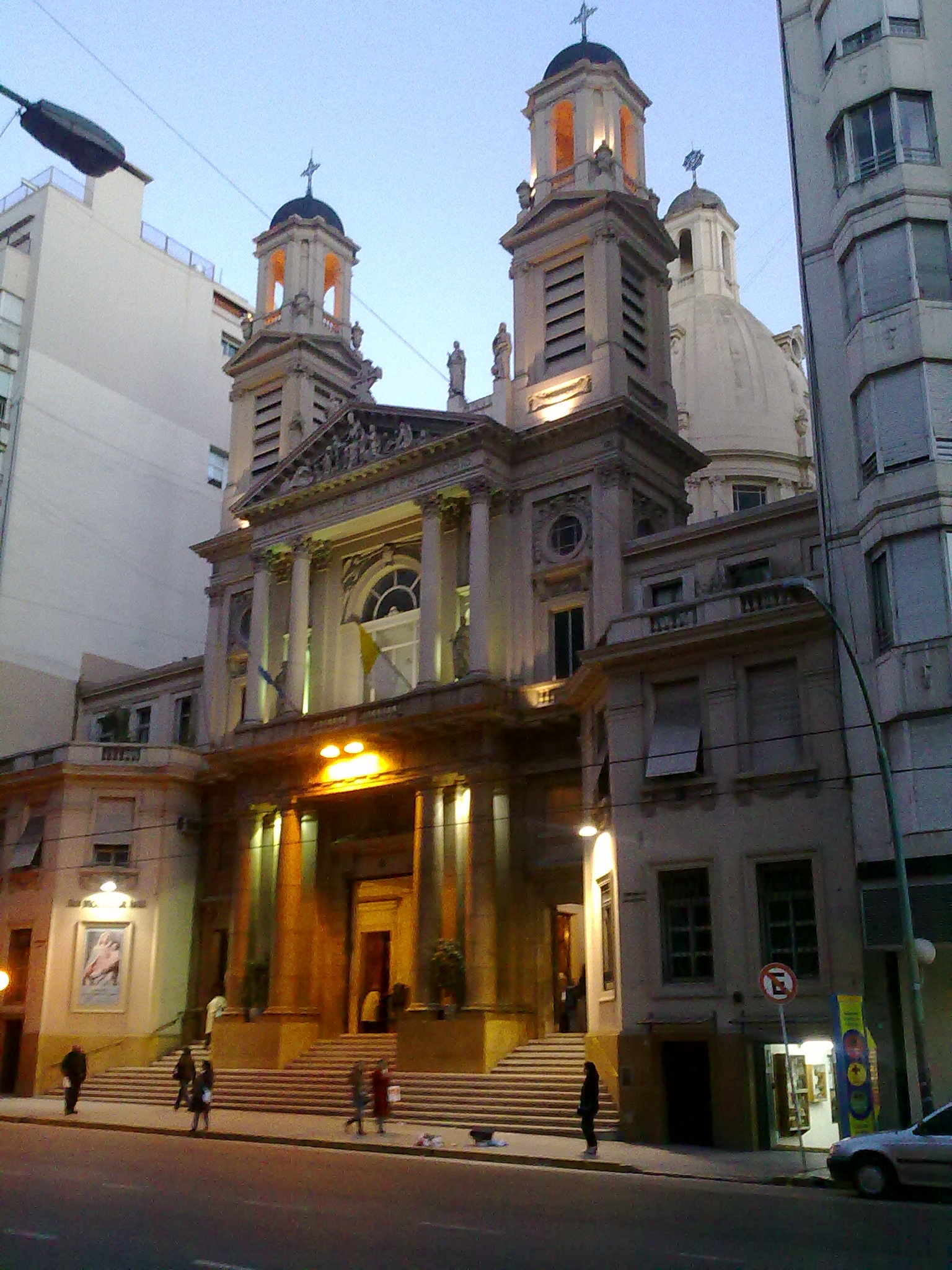 Basílica de San Nicolás de Bari, Av Santa Fe 1352, Buenos Aires, Argentina